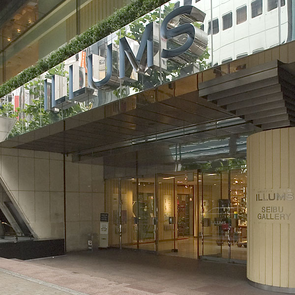 SEIBU DEPARTMENT STORES ILLUMS BUILDING 2